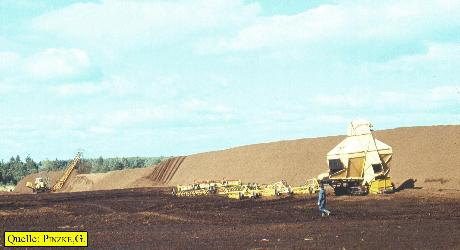 Weißtorfaufhaldung im Drispether Moor